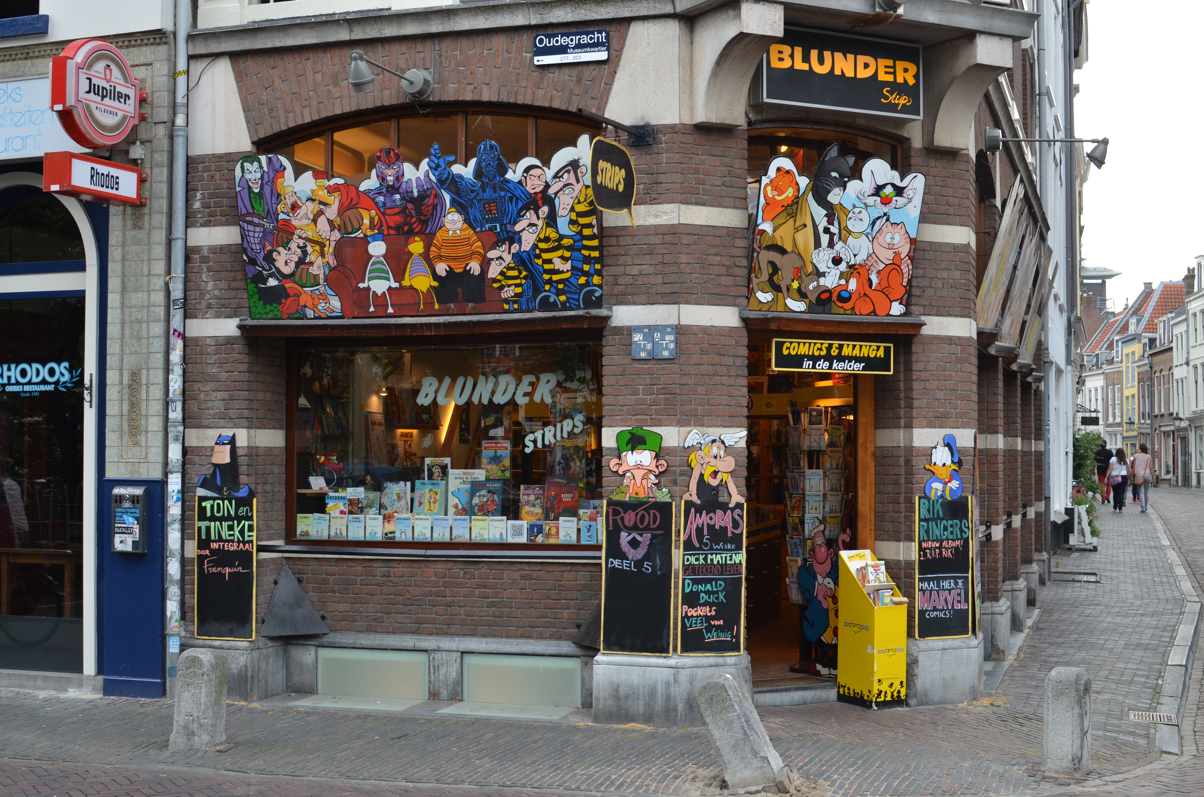 Stripboekenhandel Blunder in Utrecht.